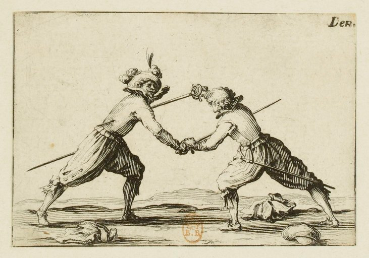 Jacques Callot (1592-1635), Graveur.- Le duel à l'épée. Dominique Vivant Denon (1747-1825 ), ancien possesseur.